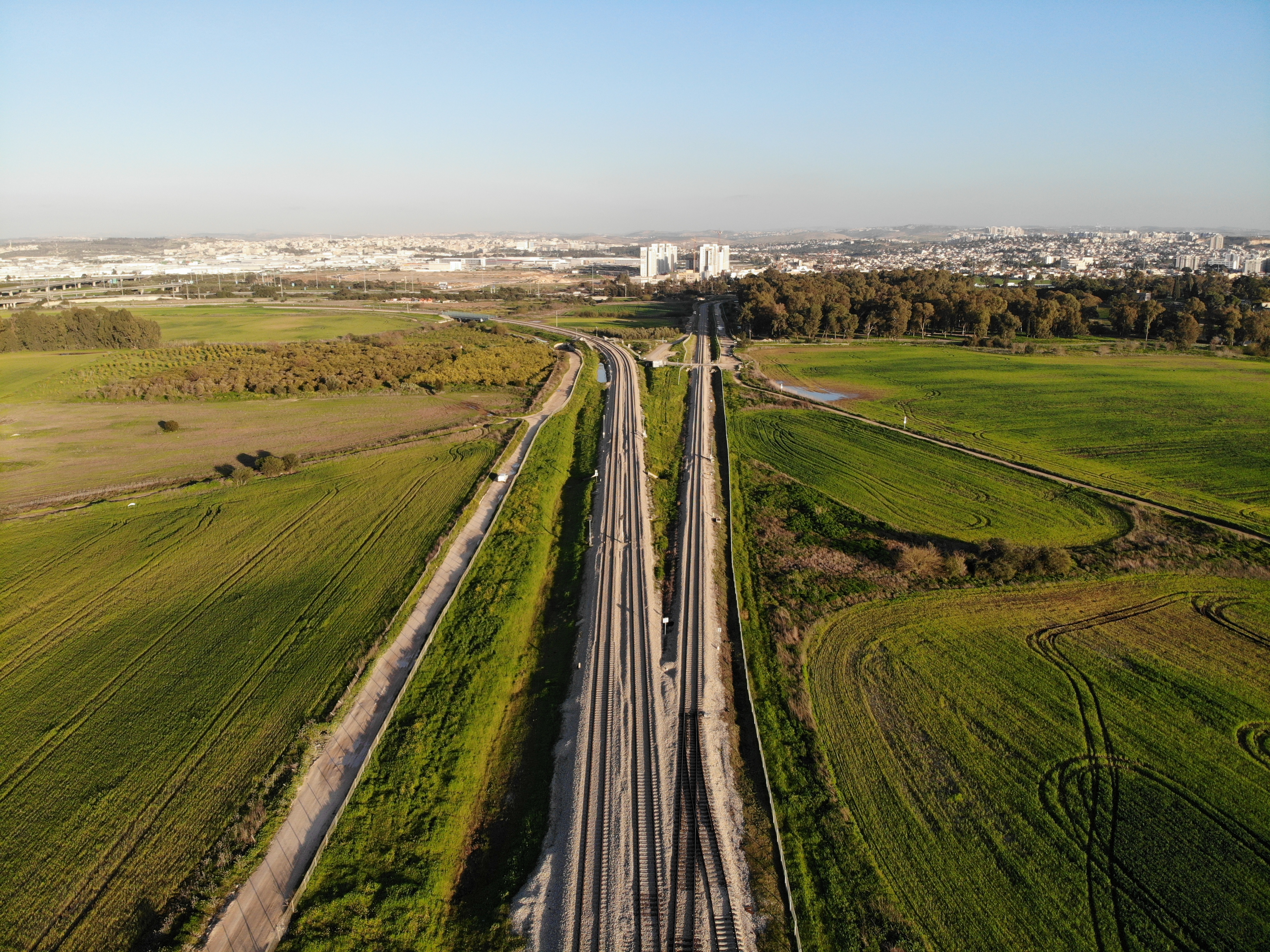 מבט לכיוון מזרח על הקצה המזרחי של מסילת הירקון. זוג המסילות שפונות שמאלה (צפונה) - קישור למסילה המזרחית לכיוון תחנת ראש העין צפון המסילה הבודדת שממשיכה ישר ופונה ימינה (דרומה) בהמשך - קישור למסילה המזרחית לכיוון תחנת ראש העין דרום ברקע בצד ימין - ראש העין ברקע בצד שמאל - מחלף קסם, אזור התעשייה של כפר קאסם וכפר קאסם חורשת העצים בצד ימין - תל אפק